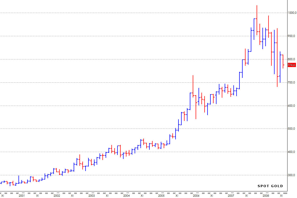 ukázka schodového grafu